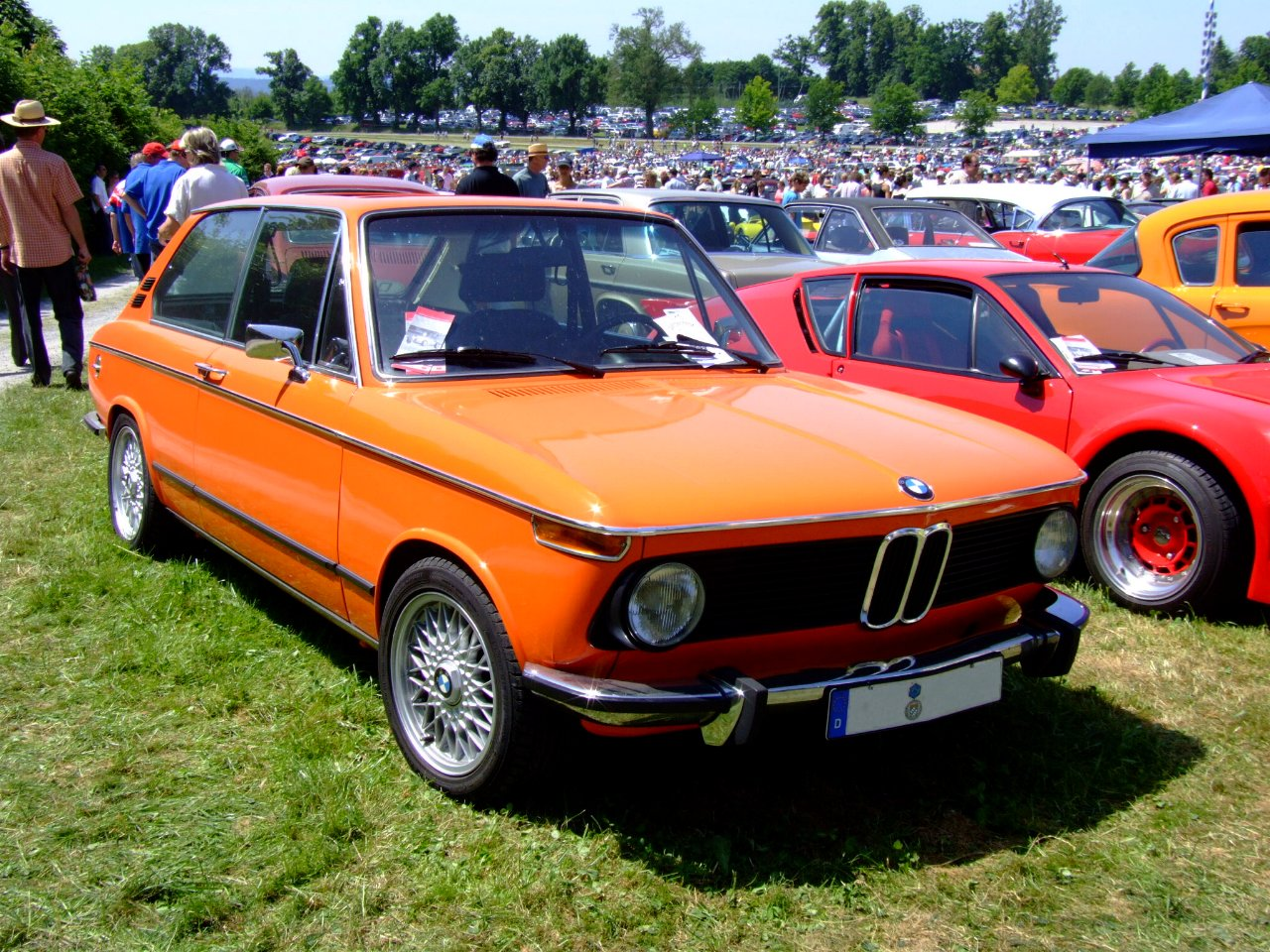 BMW 2002tii Touring Baujahr: 1974 130 PS